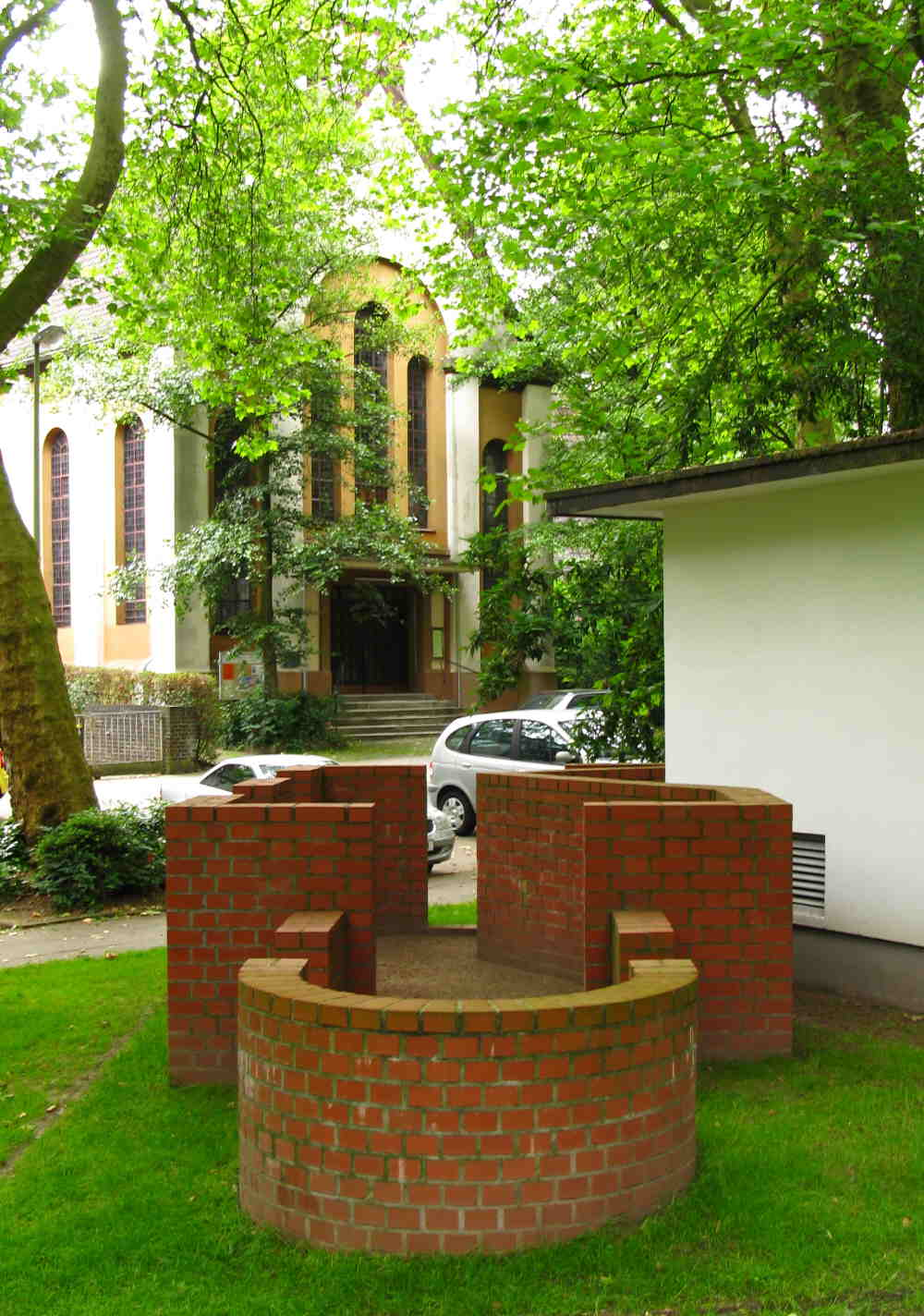 Skulptur Eine echte falsche Geschichte, 1990, von Hannes Forster auf dem Moltkeplatz in Essen